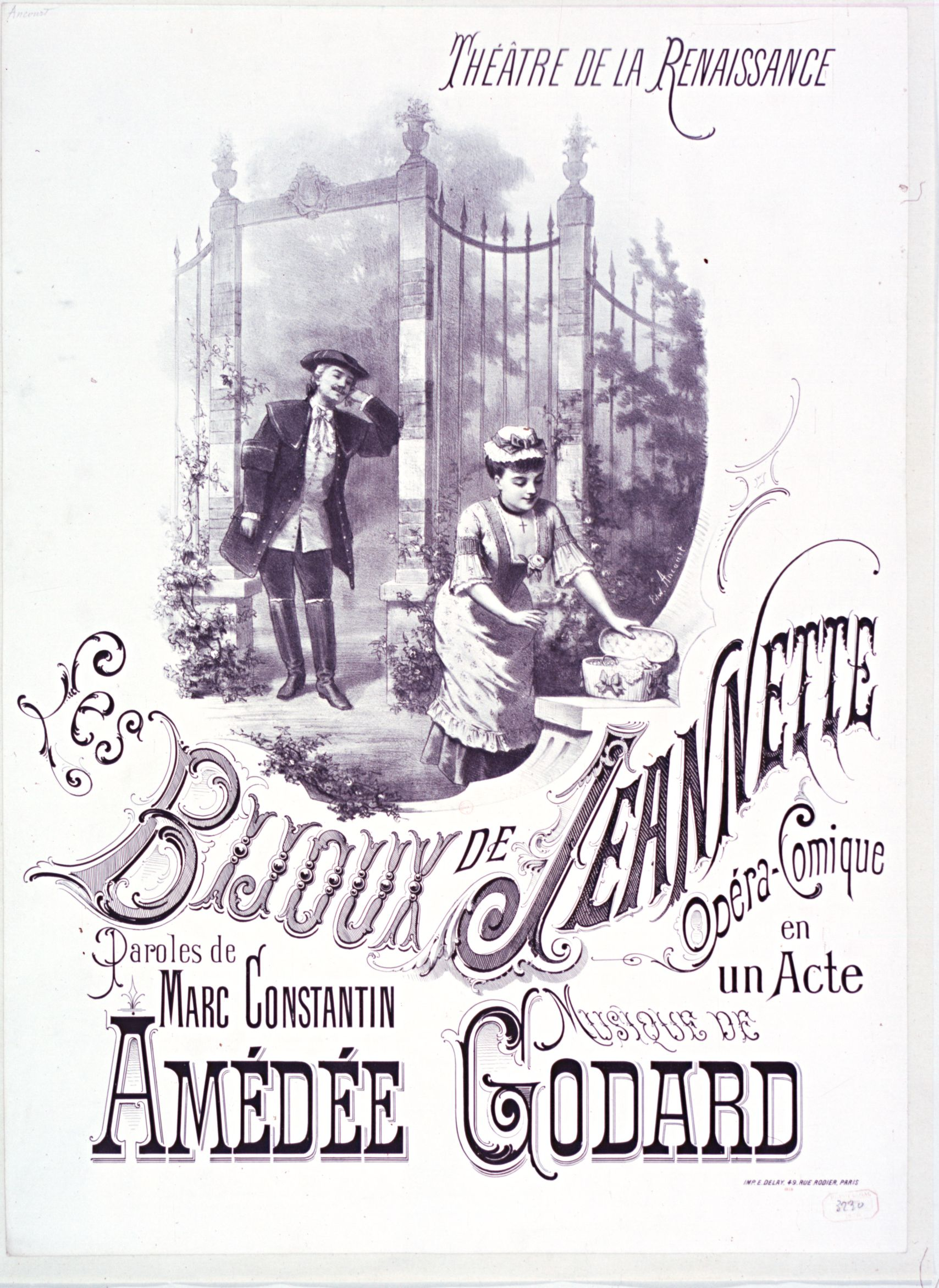 Affiche d'Edward Ancourt pour un Opéra-Comique, paroles de Mac Constantin, musique de Amédée Godard - Théâtre de la Renaissance, Paris 1878. Lithographie format 65 x 55 cm.